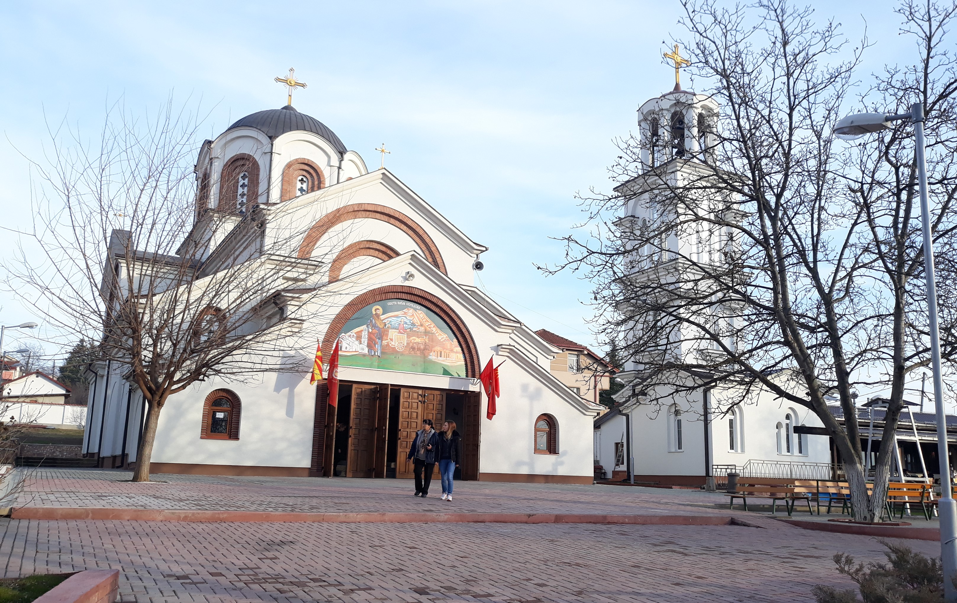 Црквата "Св . Наум Охридски"